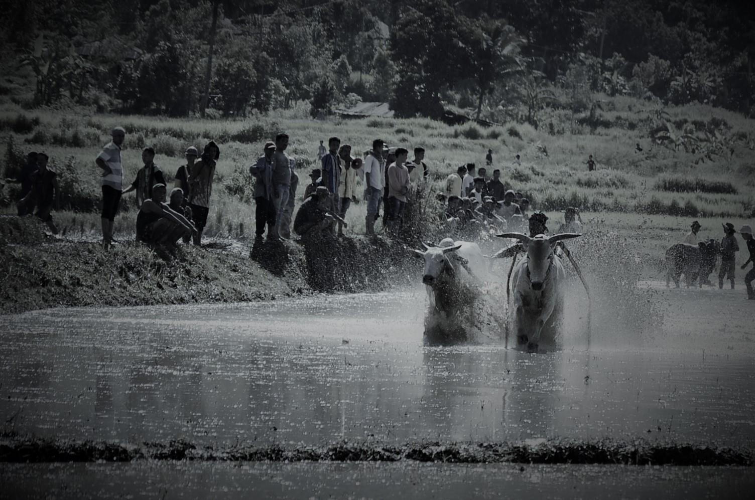 balapan sapi dalam bahasa Indonesia adalah sebuah atraksi permainan tradisional yang dilombakan di kabupaten Tanah Datar, provinsi Sumatera Barat.